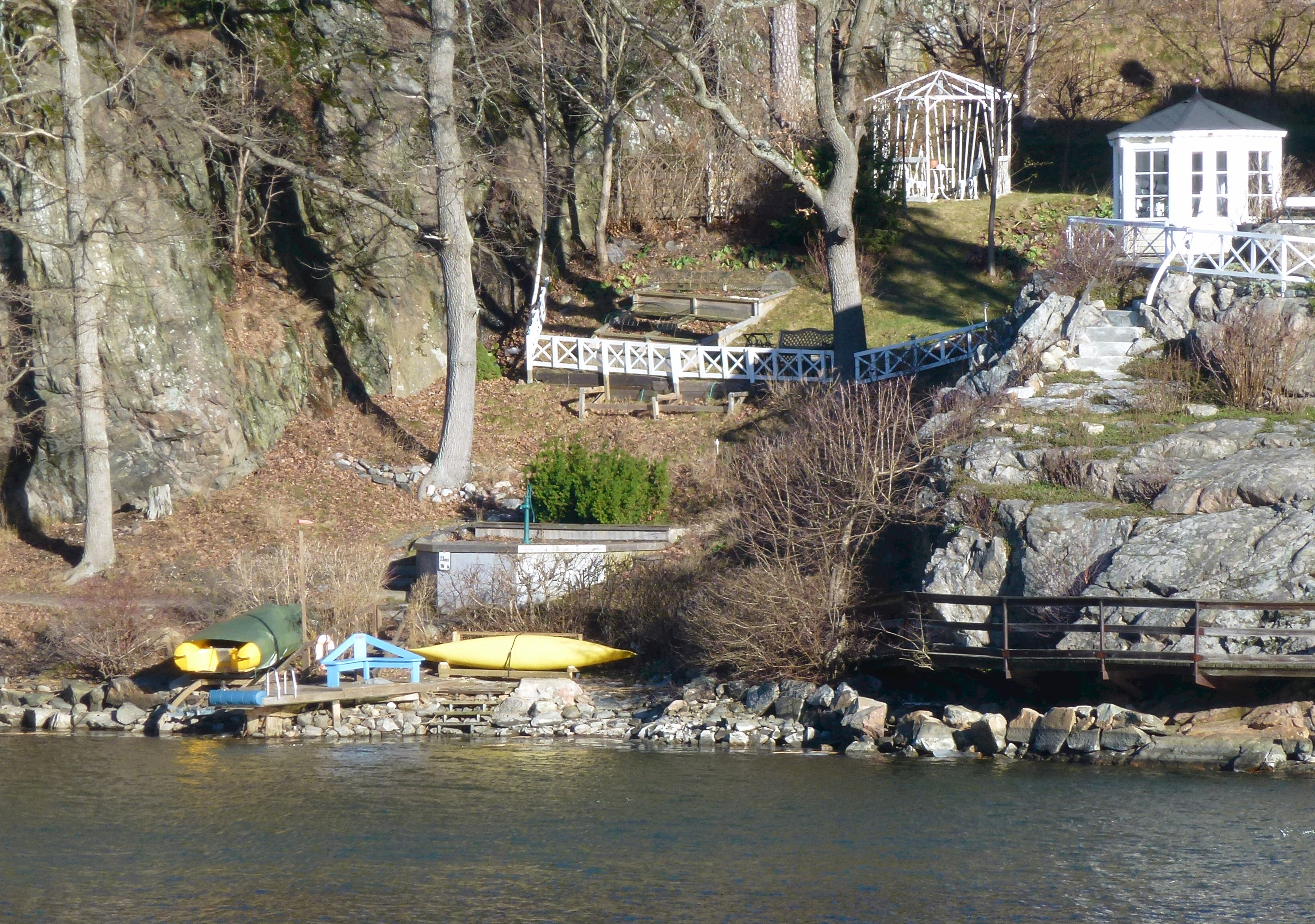 Inverness källa (med handpumpen) vid Stocksundet